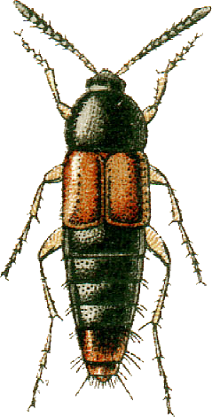 This file has been extracted from another file: Jacobs14.jpg